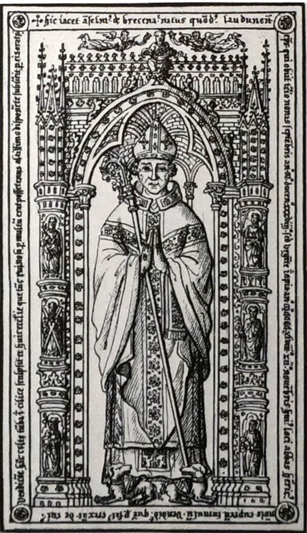 relevé fait pour Gaignières se trouvant à la BNF.